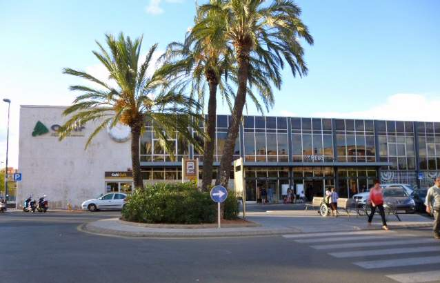 Estación de tren de Reus